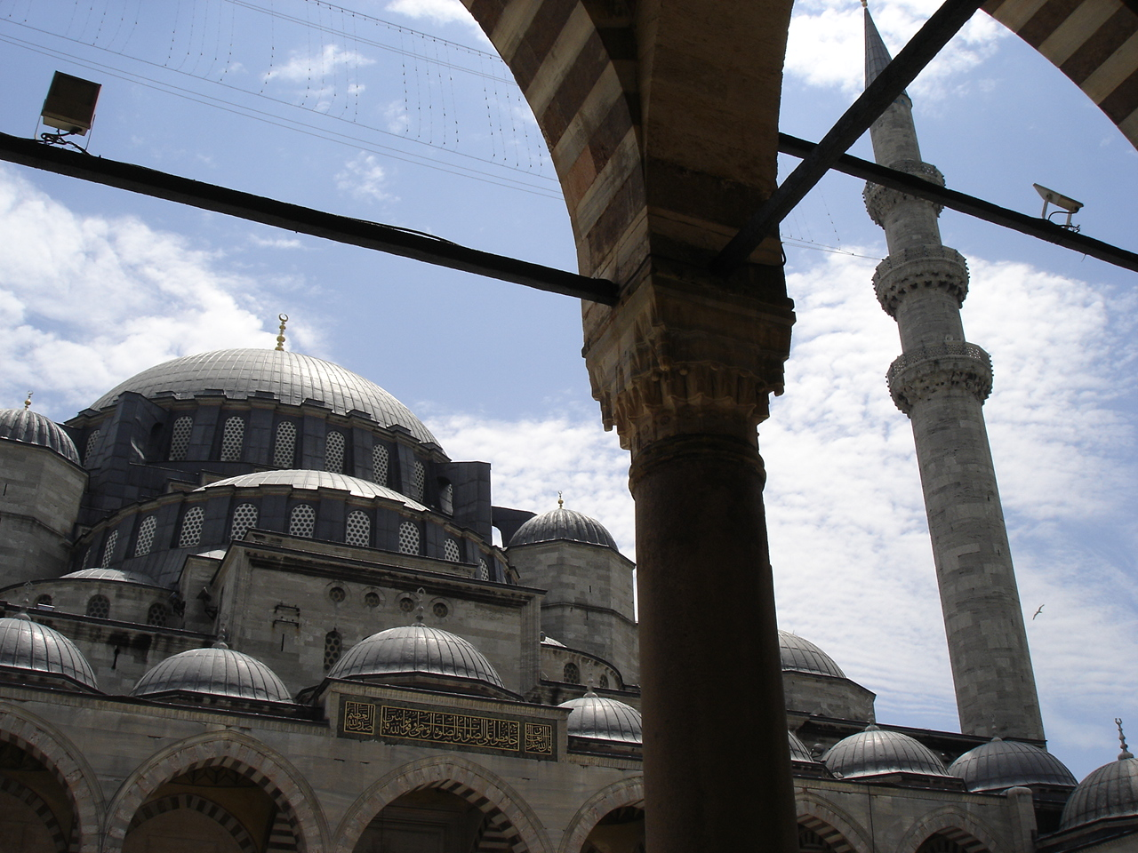 La maestosa selva di cupole e il minareto della Moschea di Solimano il Magnifico ad Istanbul. Foto di: Giovanni Dall'Orto, 26-5-2006.